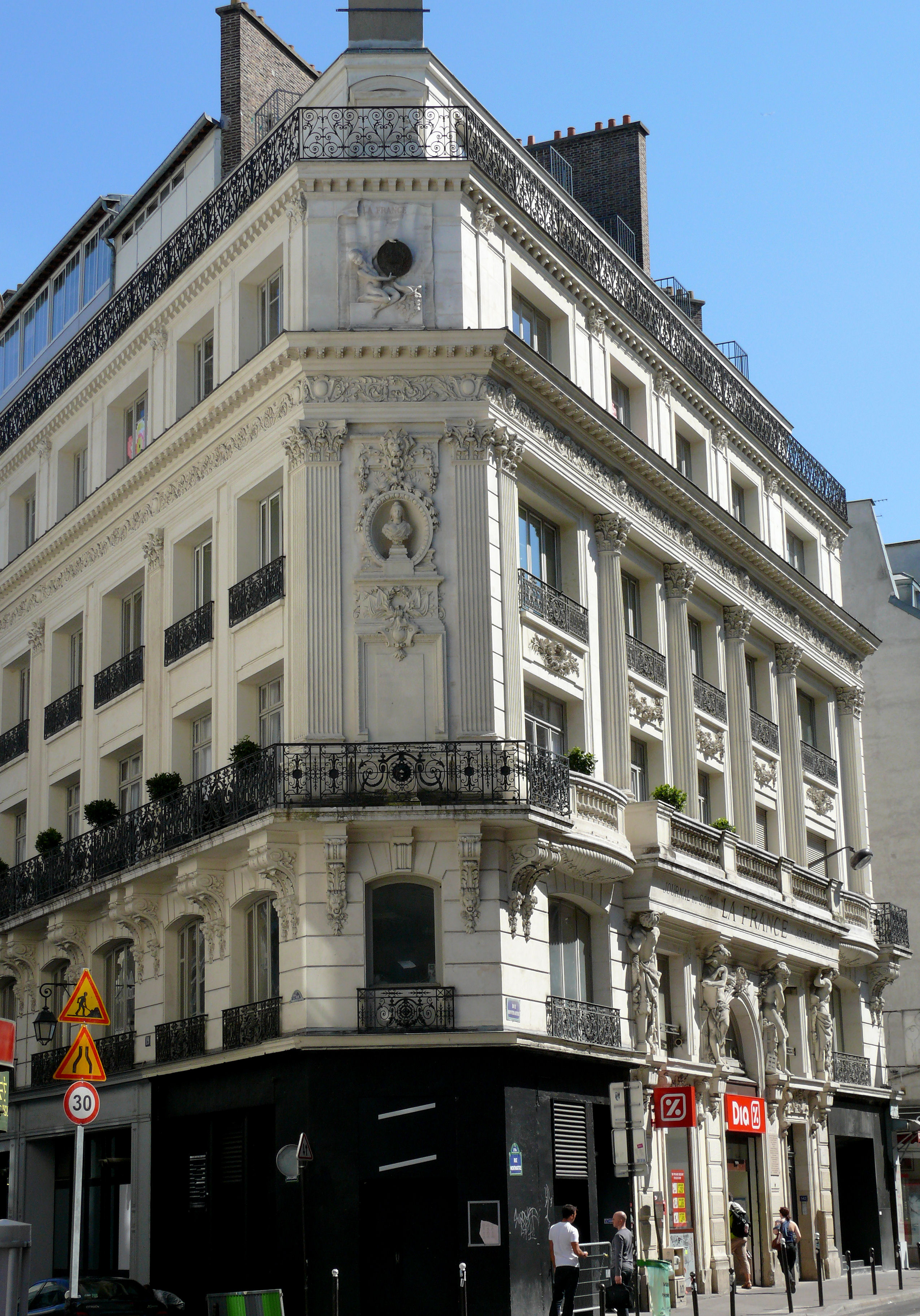 Paris 2ème arrondissement - Immeuble du journal "La France", 142 rue Montmartre